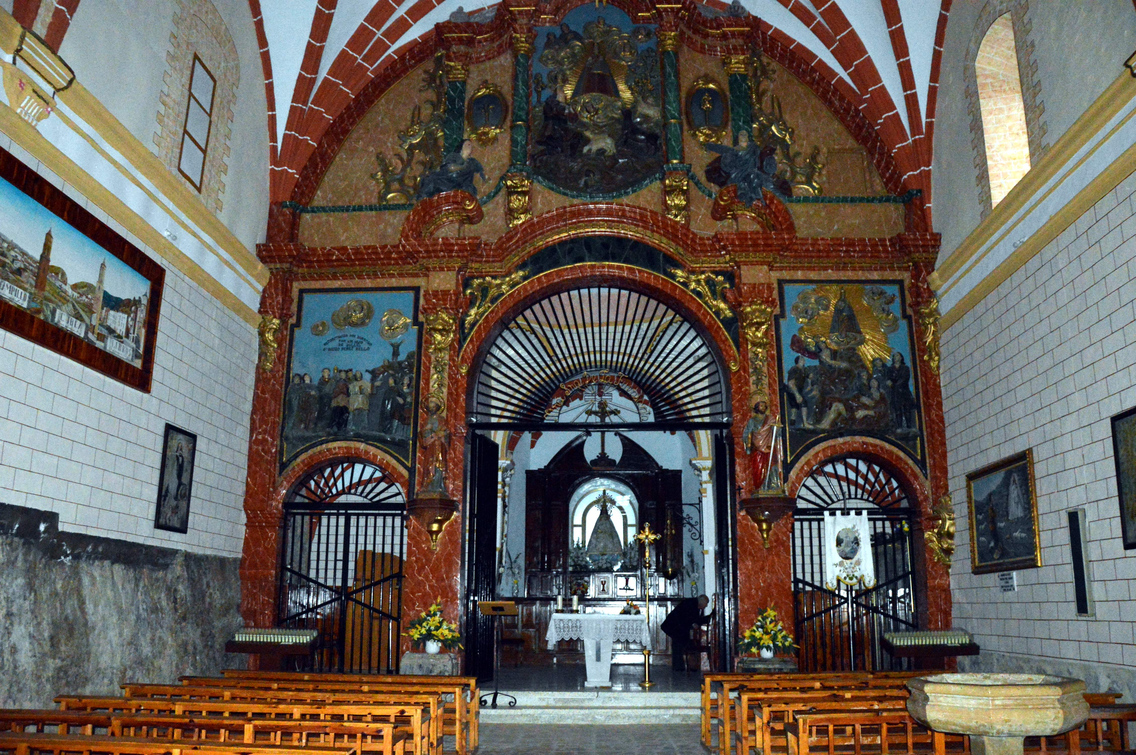 Nave del Santuario de la Fuensanta en Villel (Teruel), con el presbiterio al fondo (2019).